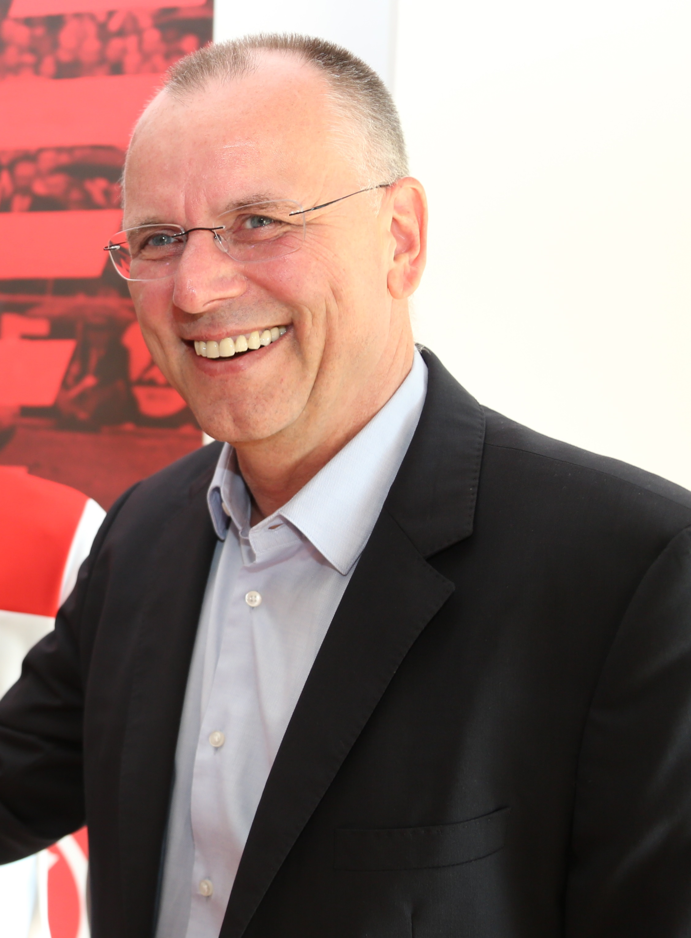 Thomas Röttgermann, Vorstandsvorsitzender von Fortuna Düsseldorf